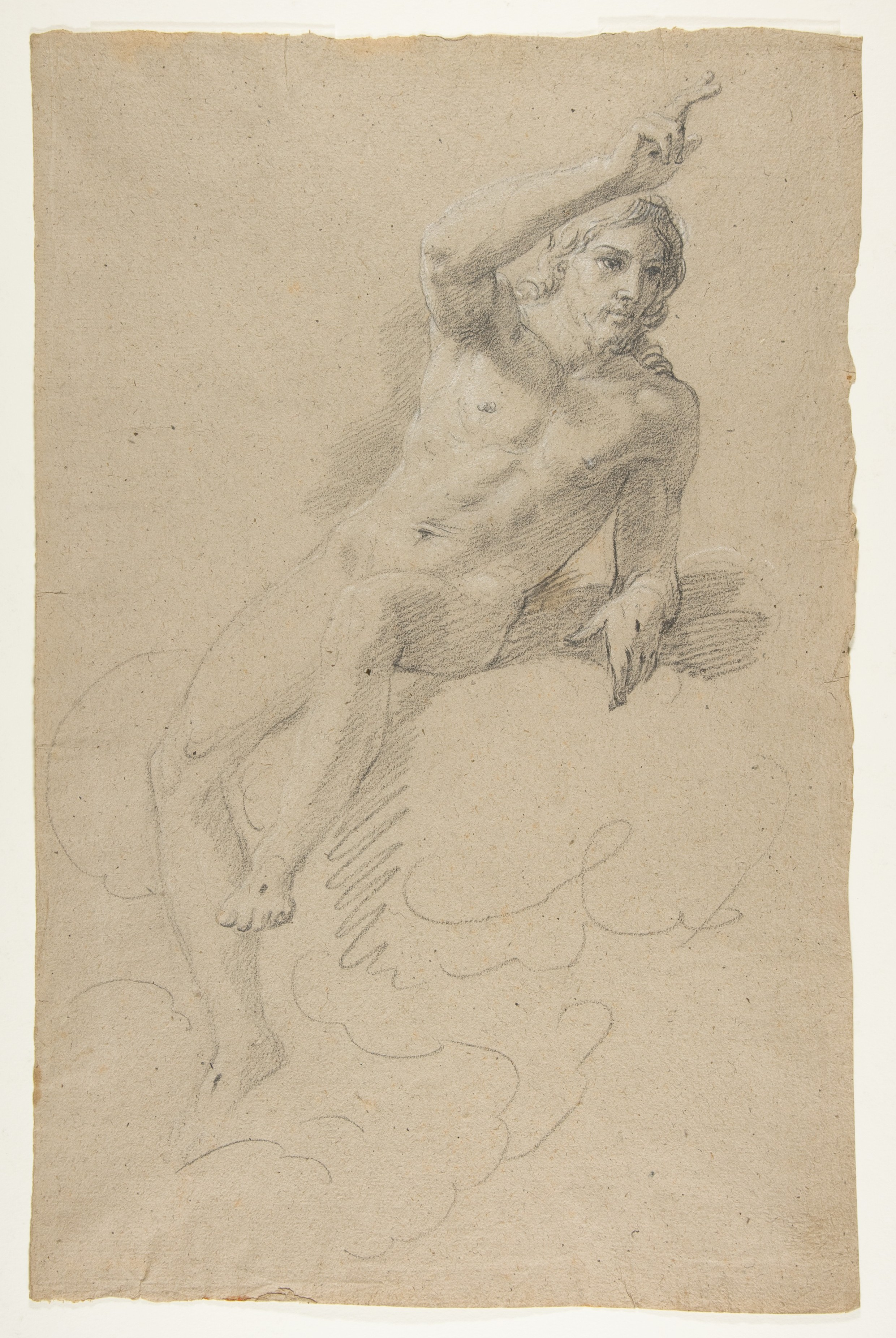 Drawing; Drawings